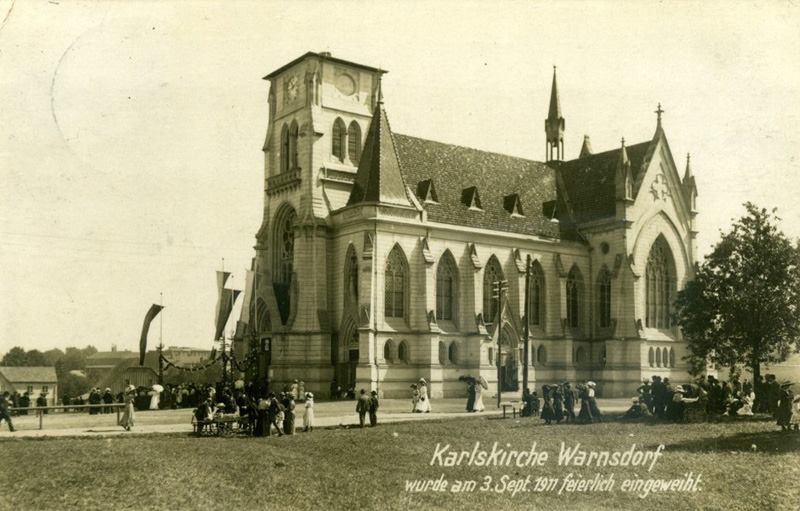 Slavnostní vysvěcení kostela sv. Karla Boromejského dne 3. září 1911